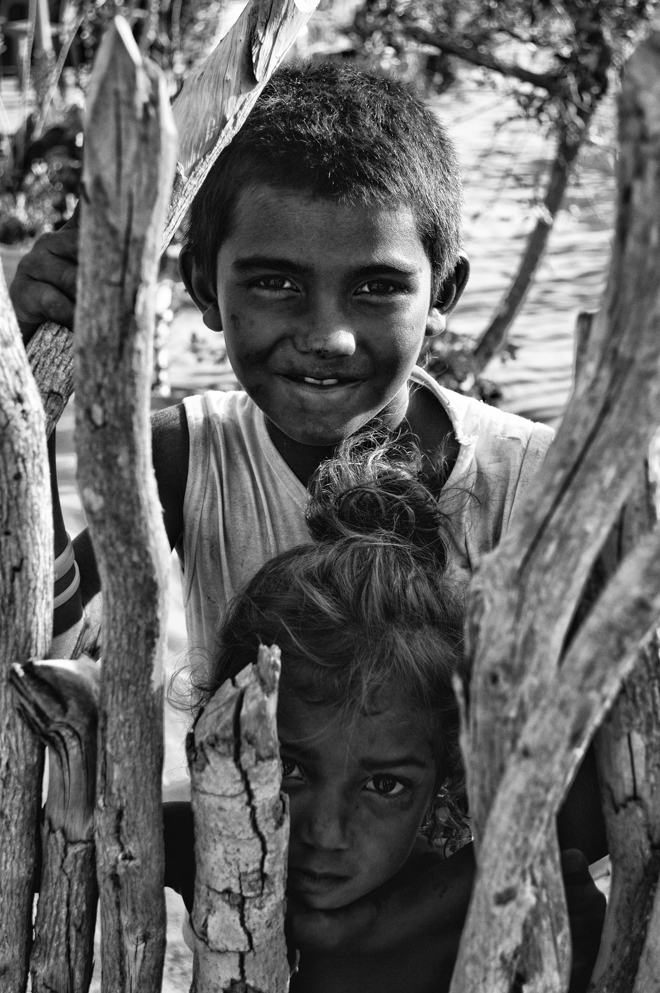 MORADORES DO VILAREJO QUEIMADA, NOS LENÇÓIS MARANHENSES